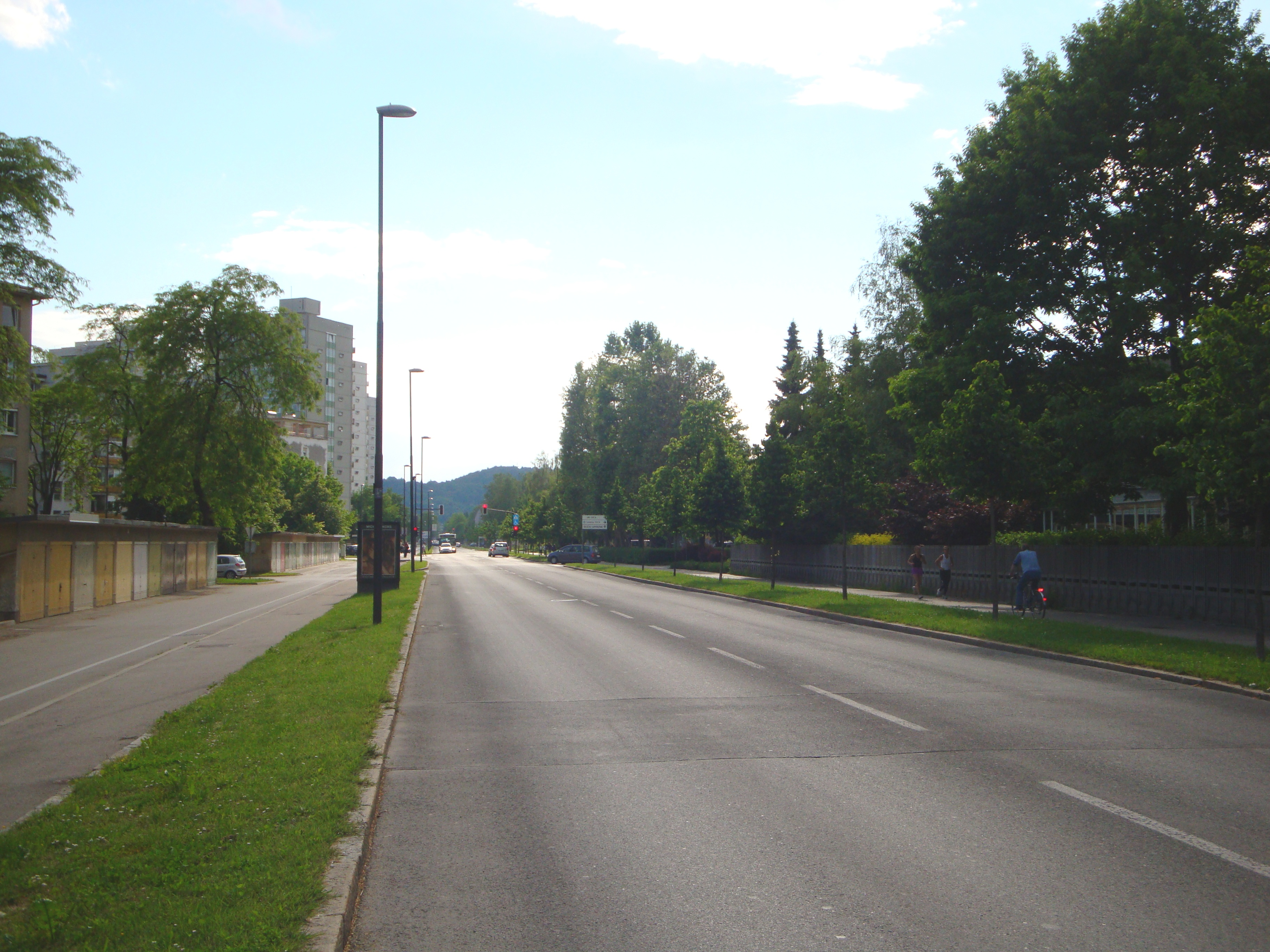 Linhartova cesta, Ljubljana